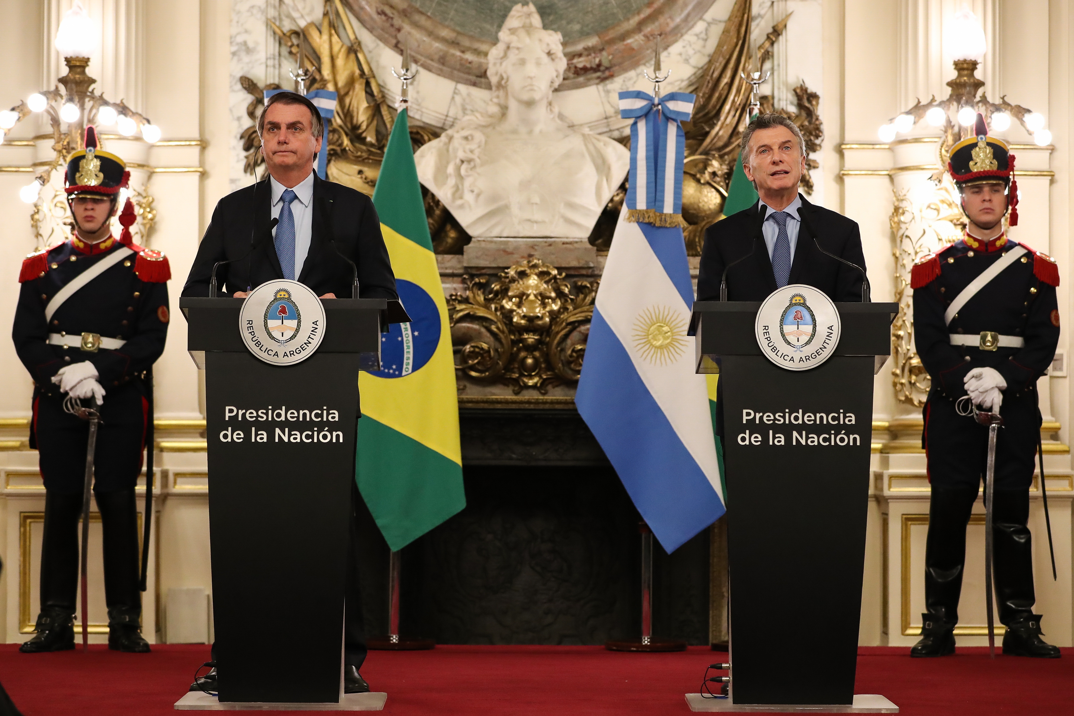 (Buenos Aires - Argentina, 06/06/2019) Presidente da República, Jair Bolsonaro e Presidente da República Argentina, Mauricio Macri durante Declaração Conjunta à Imprensa.Foto: Marcos Corrêa/PR